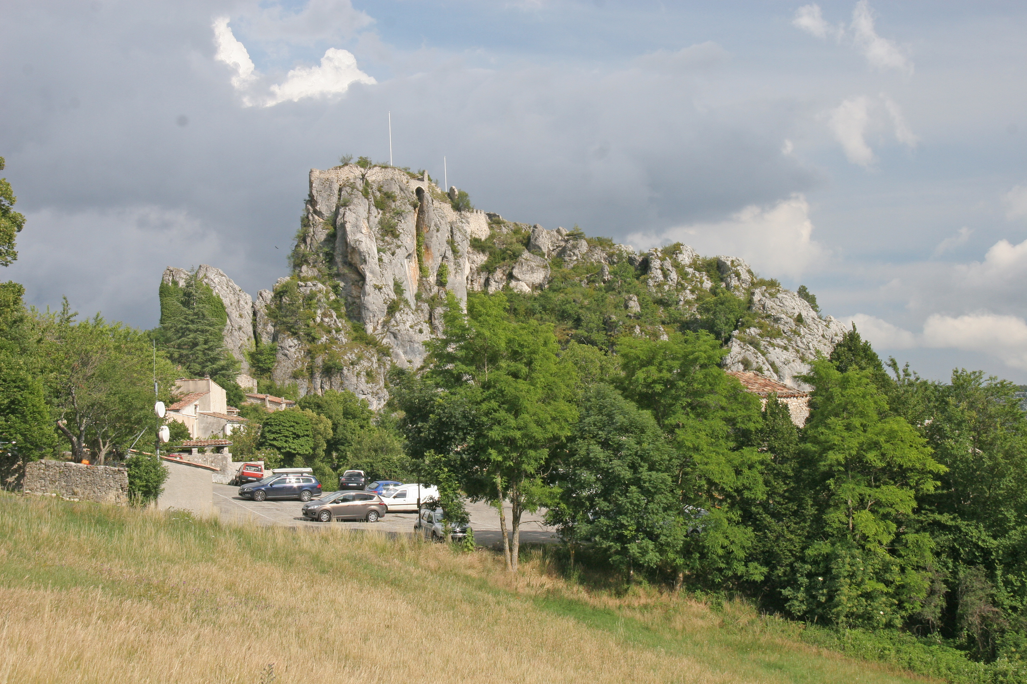 Château de Rougon